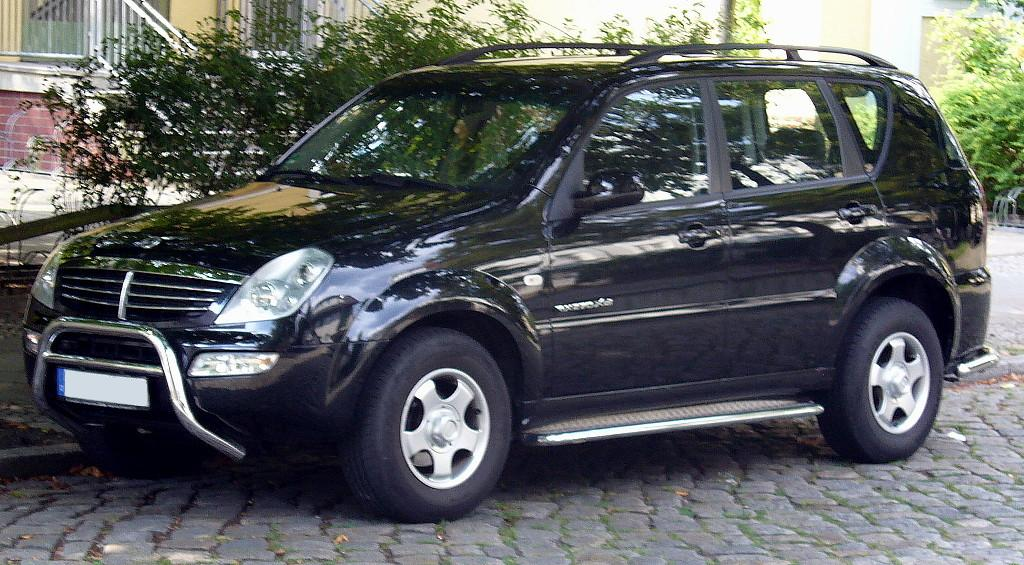 SsangYong Rexton